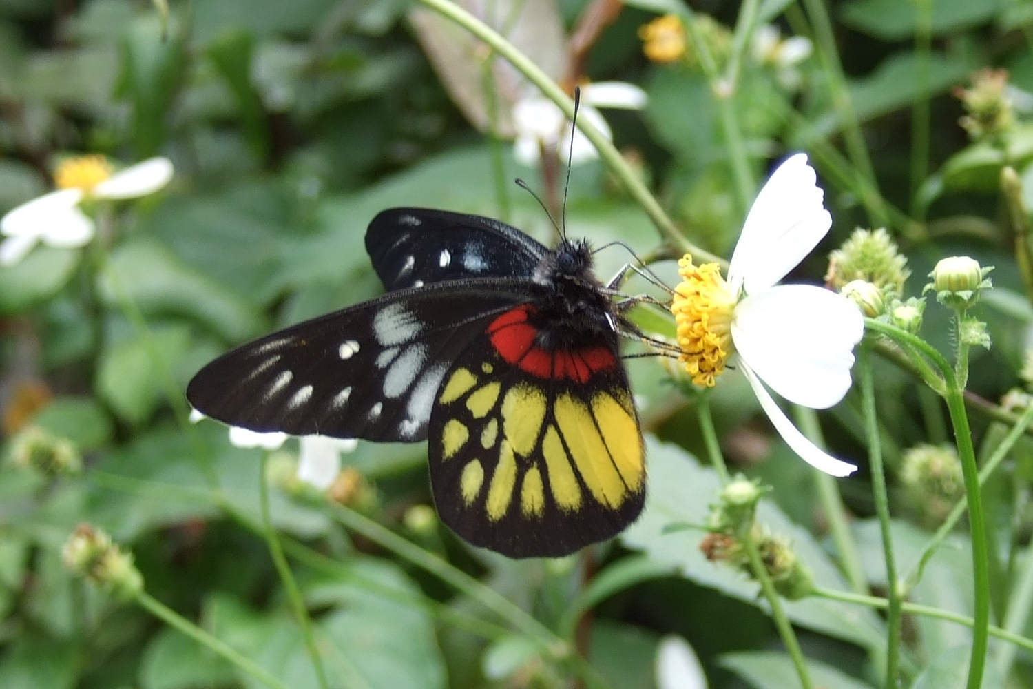 Taken in Taiwan